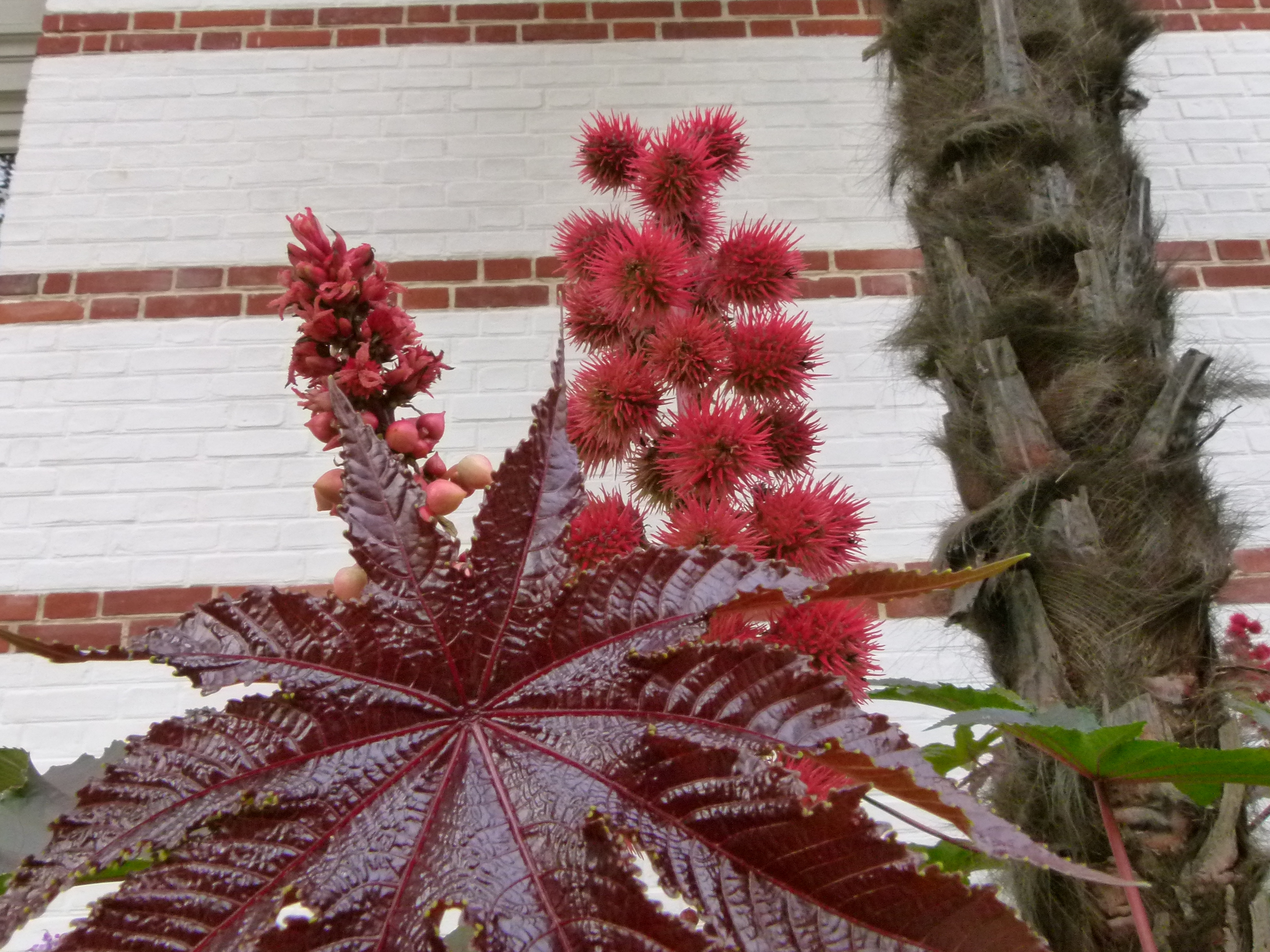 Ricin commun - Jardin Agronomique Tropical